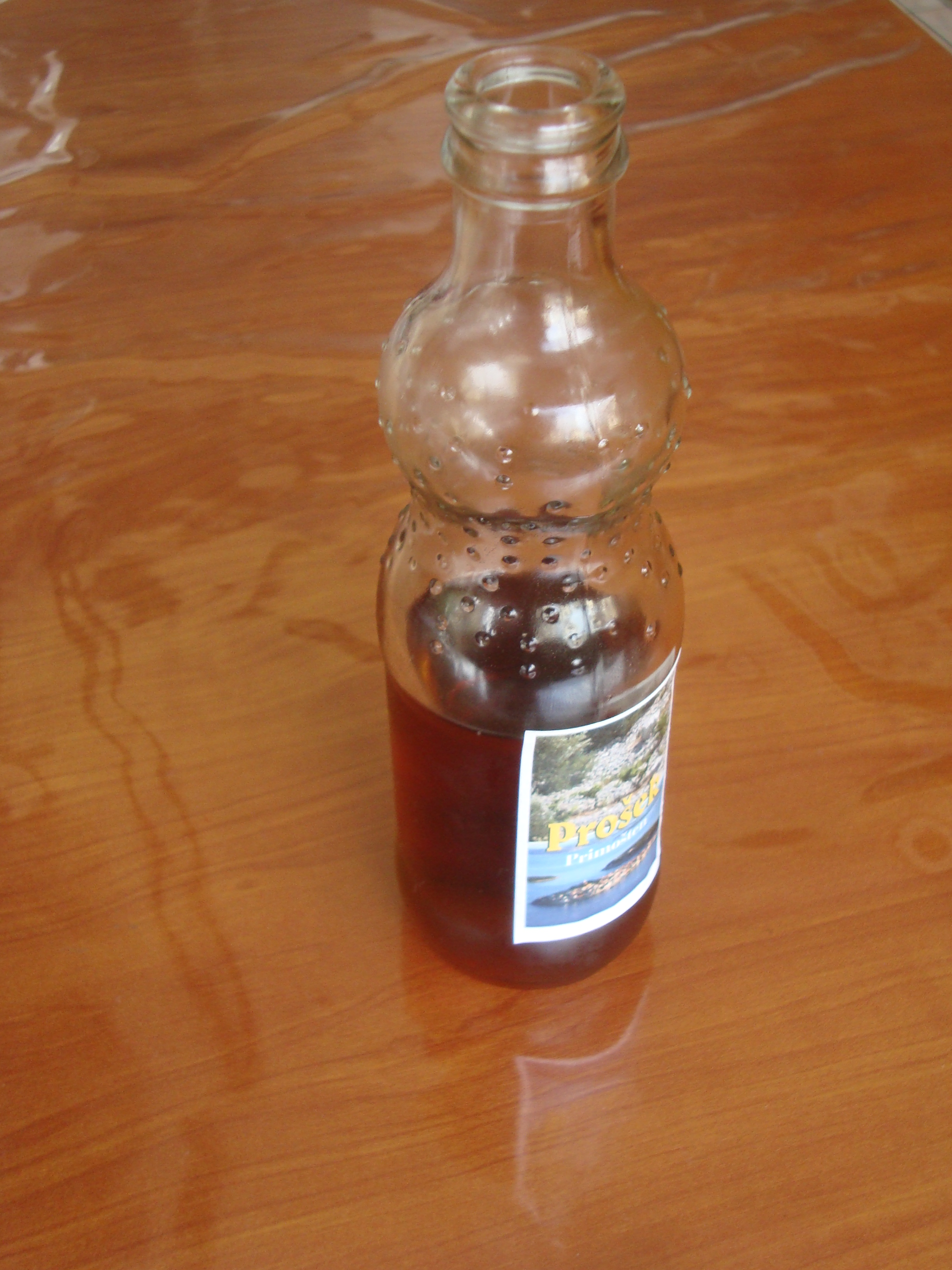 Bouteille de Prošek, vin croate